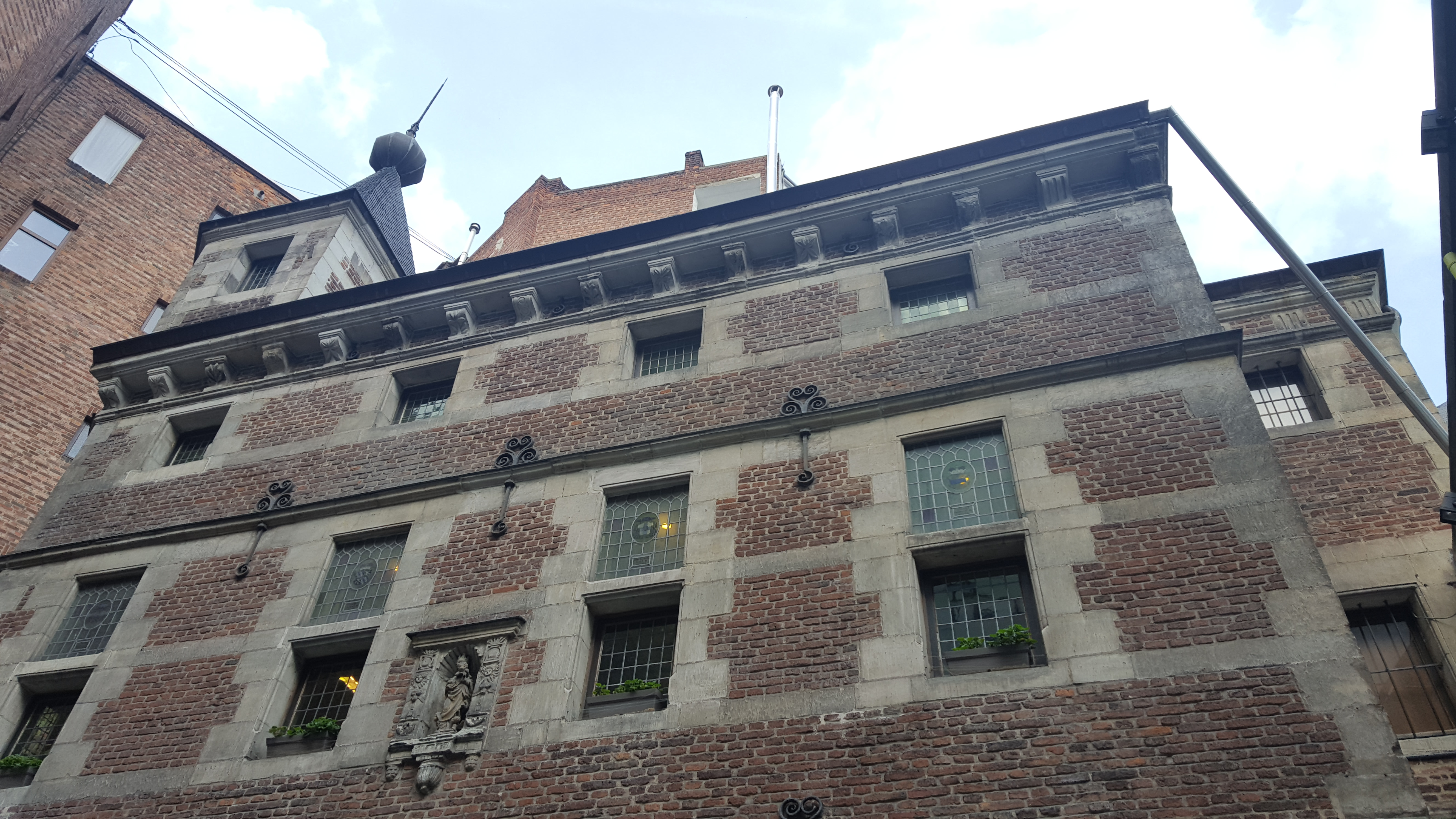 Rue Charles Magnette 5, Liège, Belgique